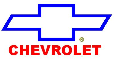 Logo de Chevrolet